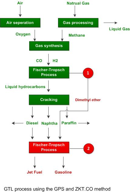 فرآیند GTL توسط GPS وZKT.co